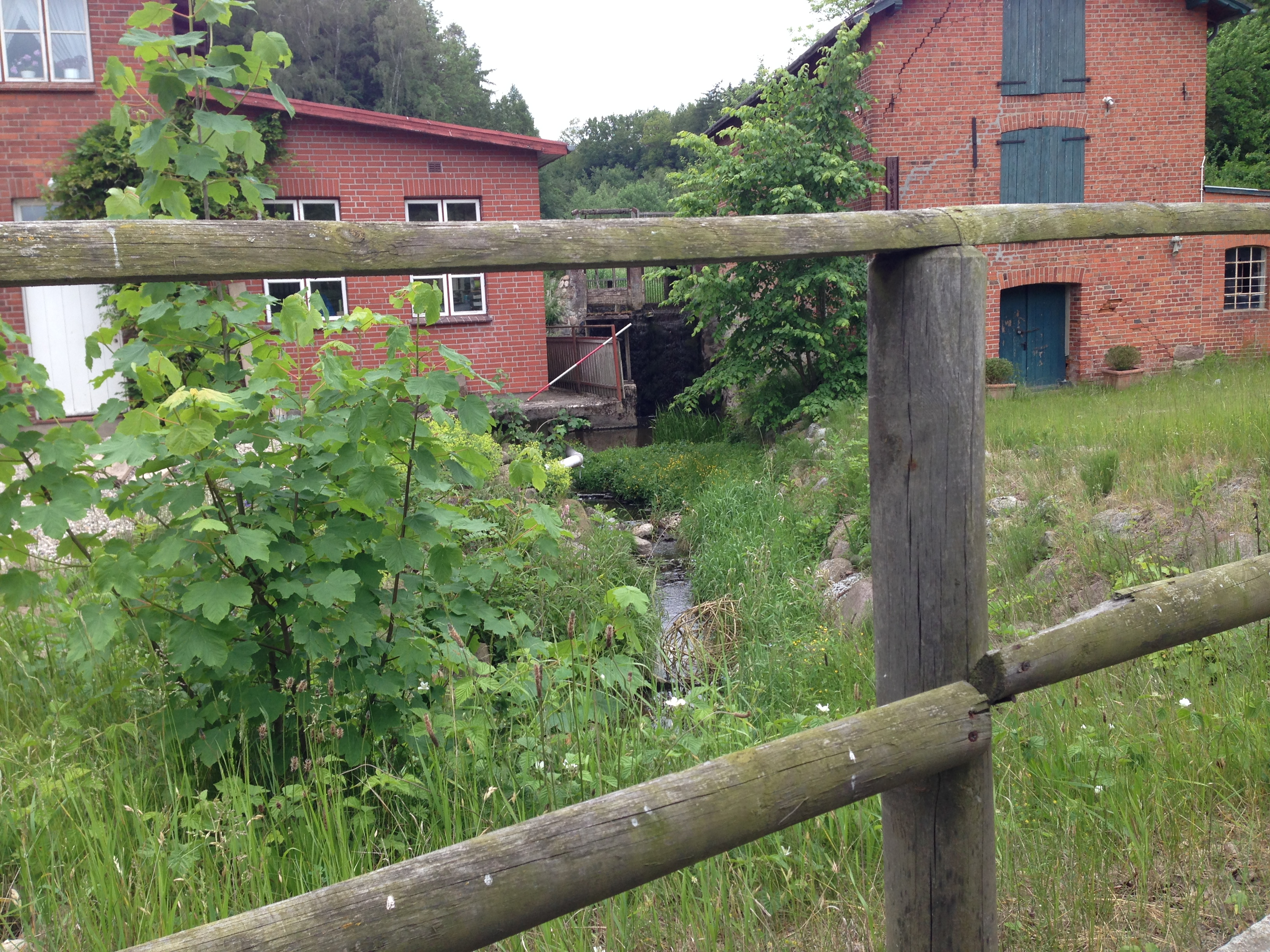 Remains of former watermill in Schwinkenrade.